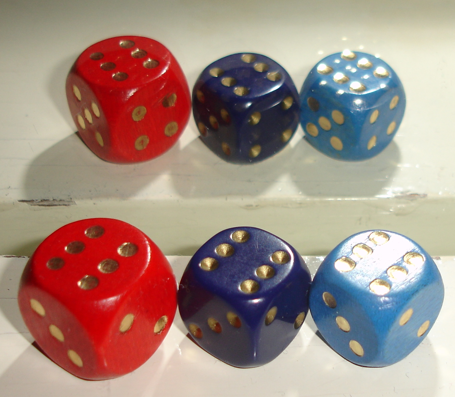 Description Alle dobbelstenen zijn identiekDate 8 February 2007Source Own workAuthor Handige Harry Alle dobbelstenen zijn identiek